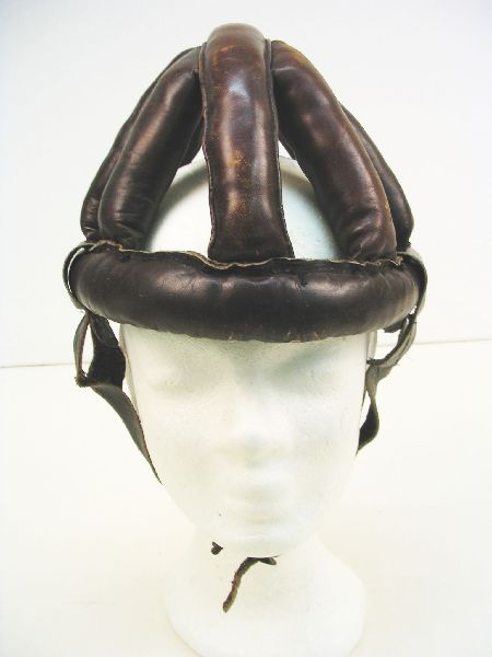 Biking helmet. Tampere Museums.